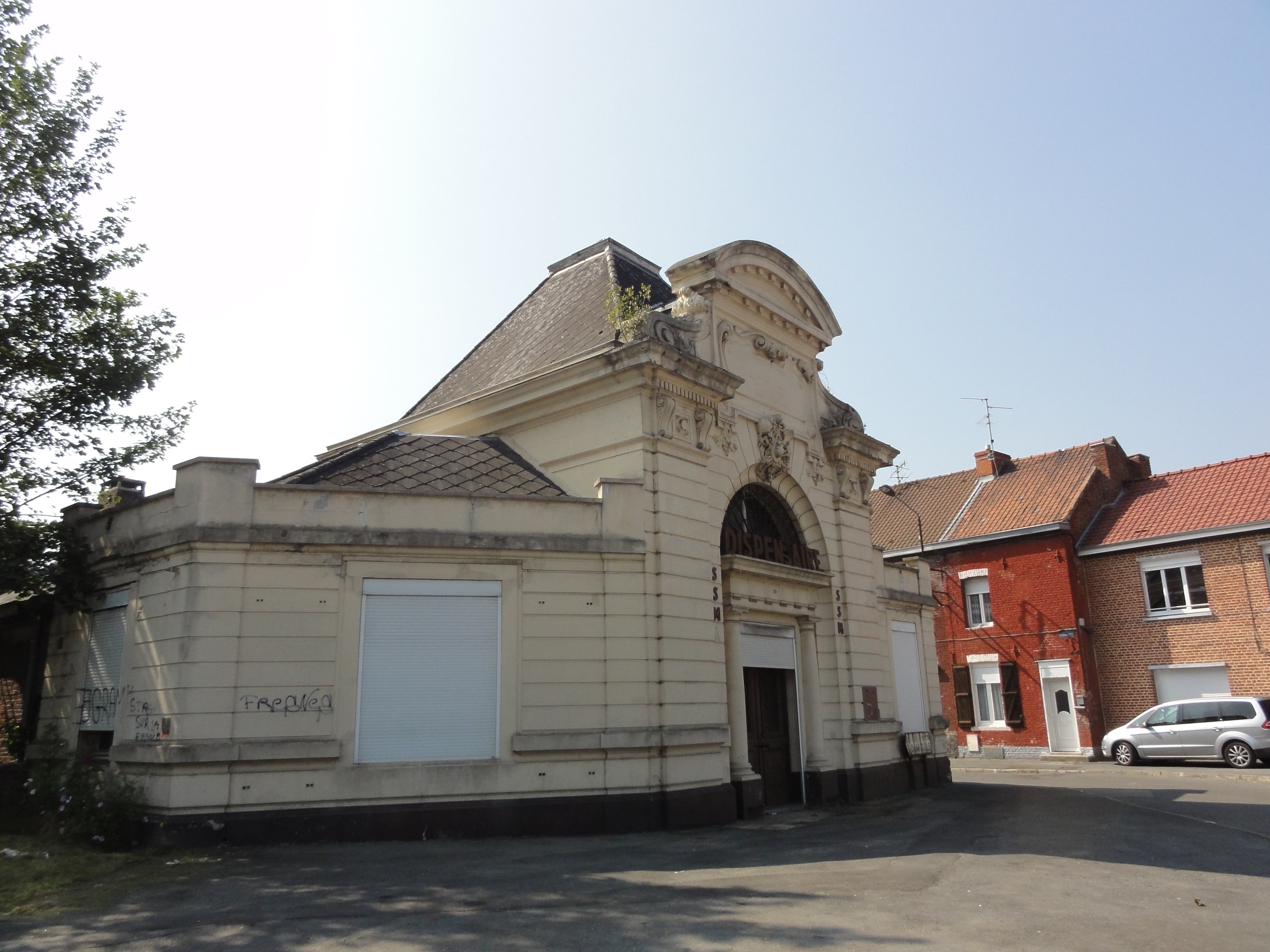 Grands bureaux de la Compagnie des mines de Thivencelle, Fresnes-sur-Escaut, Nord, Nord-Pas-de-Calais, France. .